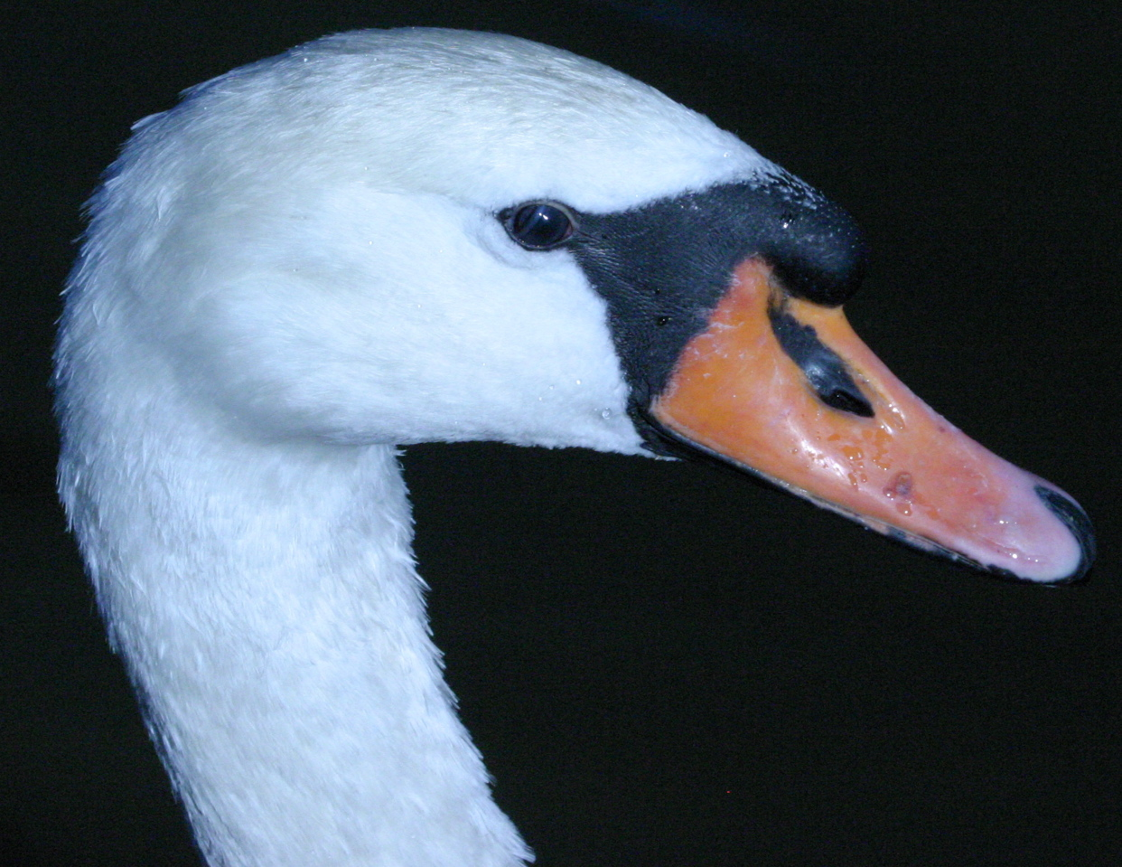 Object: Hoeckerschwan (C.olor) Source: self Photographer: Nils Fretwurst / Foto: Nils Fretwurst Date: December 2003